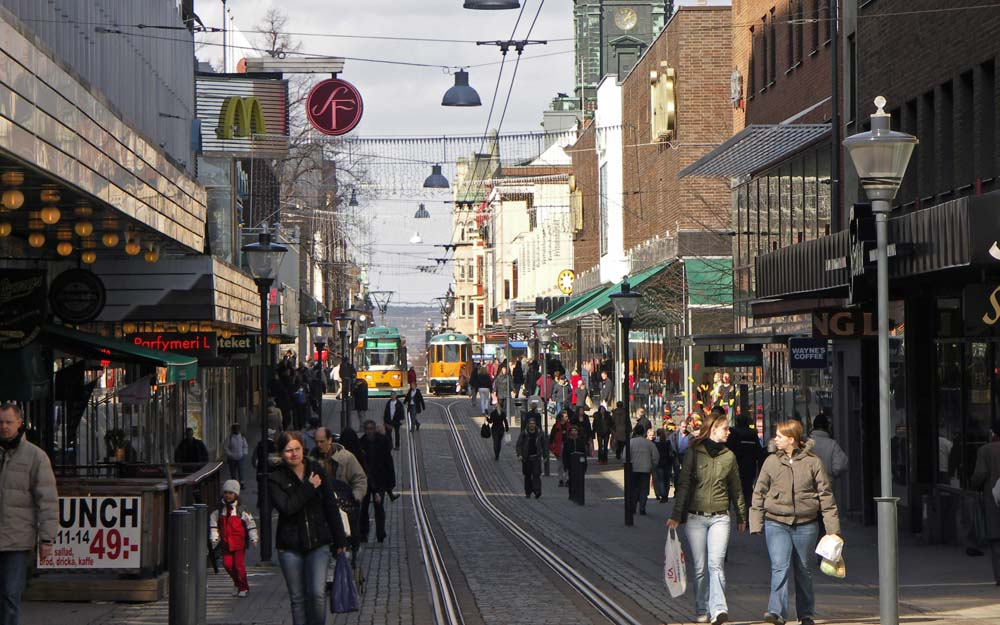 Norrköping, Suedia. Centrul orașului, artera comercială Drottningsgatan.